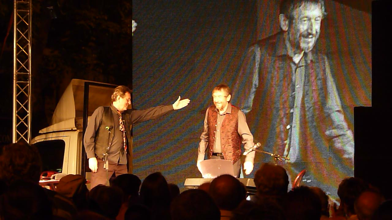 A felvétel 2013. augusztus 31 -én szombaton készült Budapesten, a Pozsonyi utcában, 5. Pozsonyi Piknik. Jávori Ferenc, Fegya. ©© Derzsi Elekes Andor, Budapest, 2013, You are authorised to use these photos and vids under Creative Commons – even for commercial, for profit purposes. Photos must be attributed to Derzsi Elekes Andor. All of the photos and vids in the Metapolisz DVD line are under Creative Commons and can be used even for commercial – for profit – purposes. Recommended Citation Derzsi Elekes Andor: Metapolisz DVD line